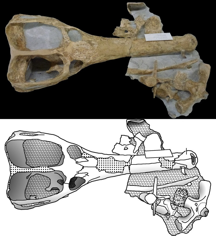 Machimosaurus buffetauti sp. nov., SMNS 91415, holotype. Skull (with associated postcrania) in dorsal view, (a) photograph and (b) line drawing. fr, frontal; mx, maxilla; na, nasals; pre, prefrontal; pmx, premaxilla.